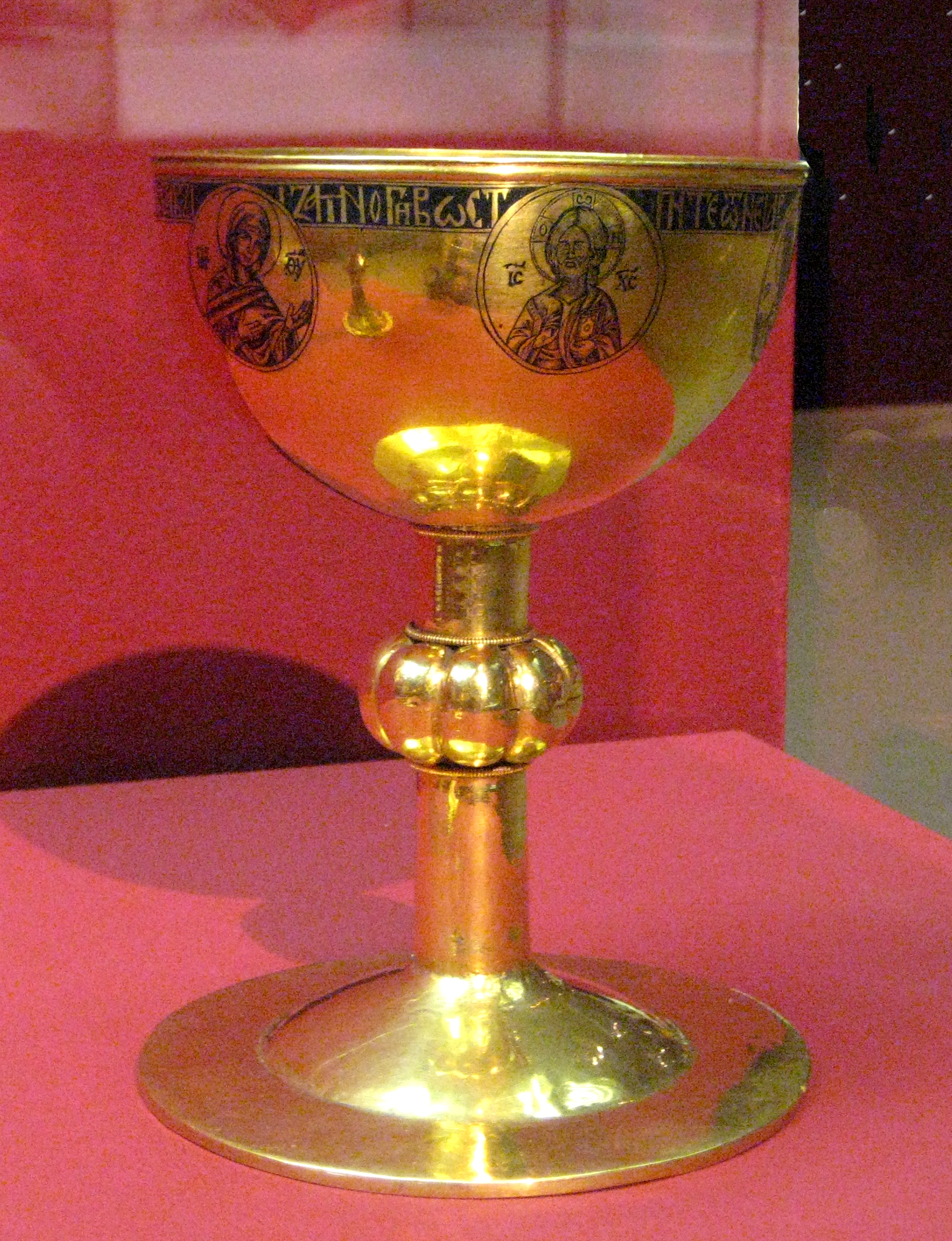 ПОТИР Вторая половина XVI века Москва, Мастерские Московского Кремля Золото; чеканка, резьба, чернь Высота – 22,5; диаметр чаши – 15,2; диаметр поддона – 16,7 Поступил в 1922 году Происходит из Благовещенского собора Московского Кремля ММК инв. МР-1145